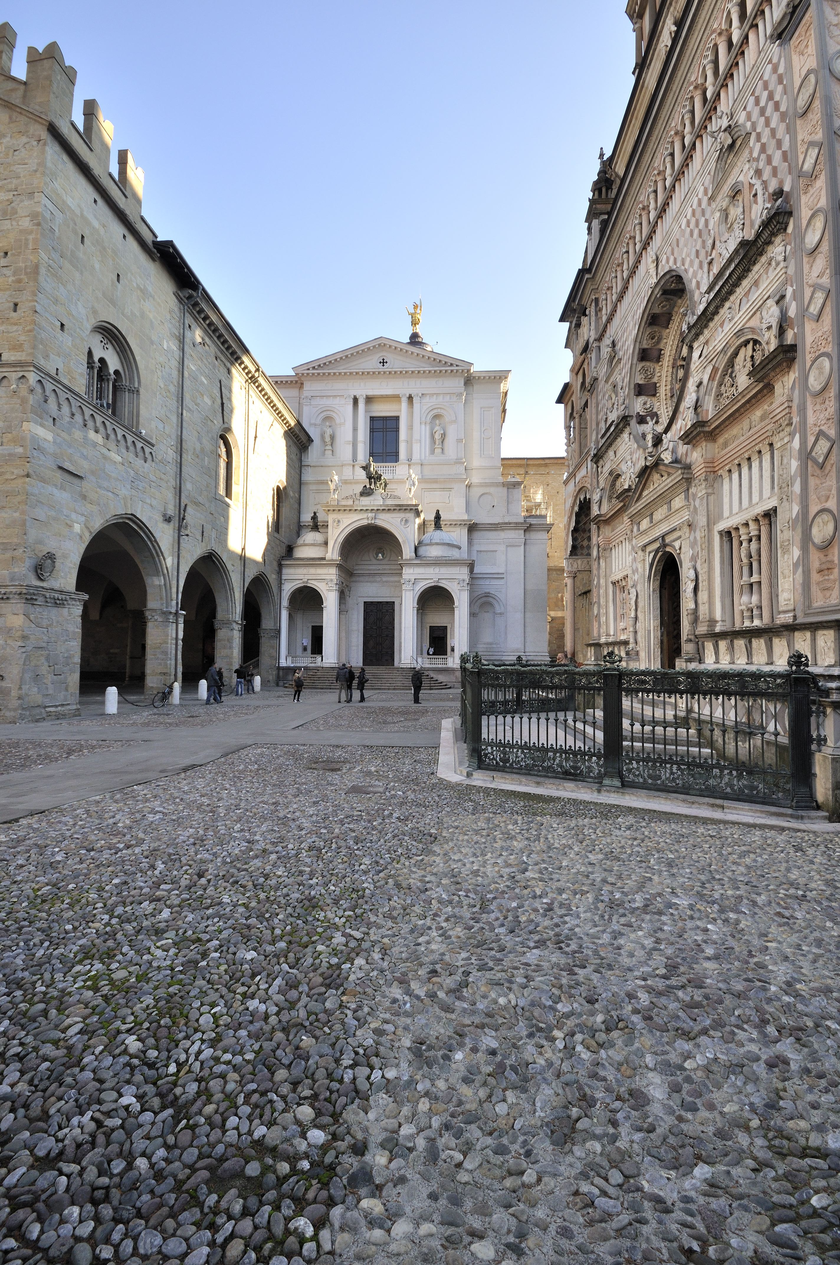 La Piazza